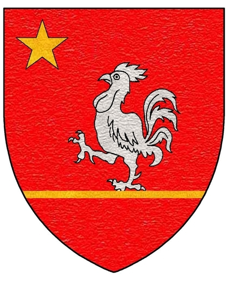 Blason de la famille Le Prévost de Basserode.